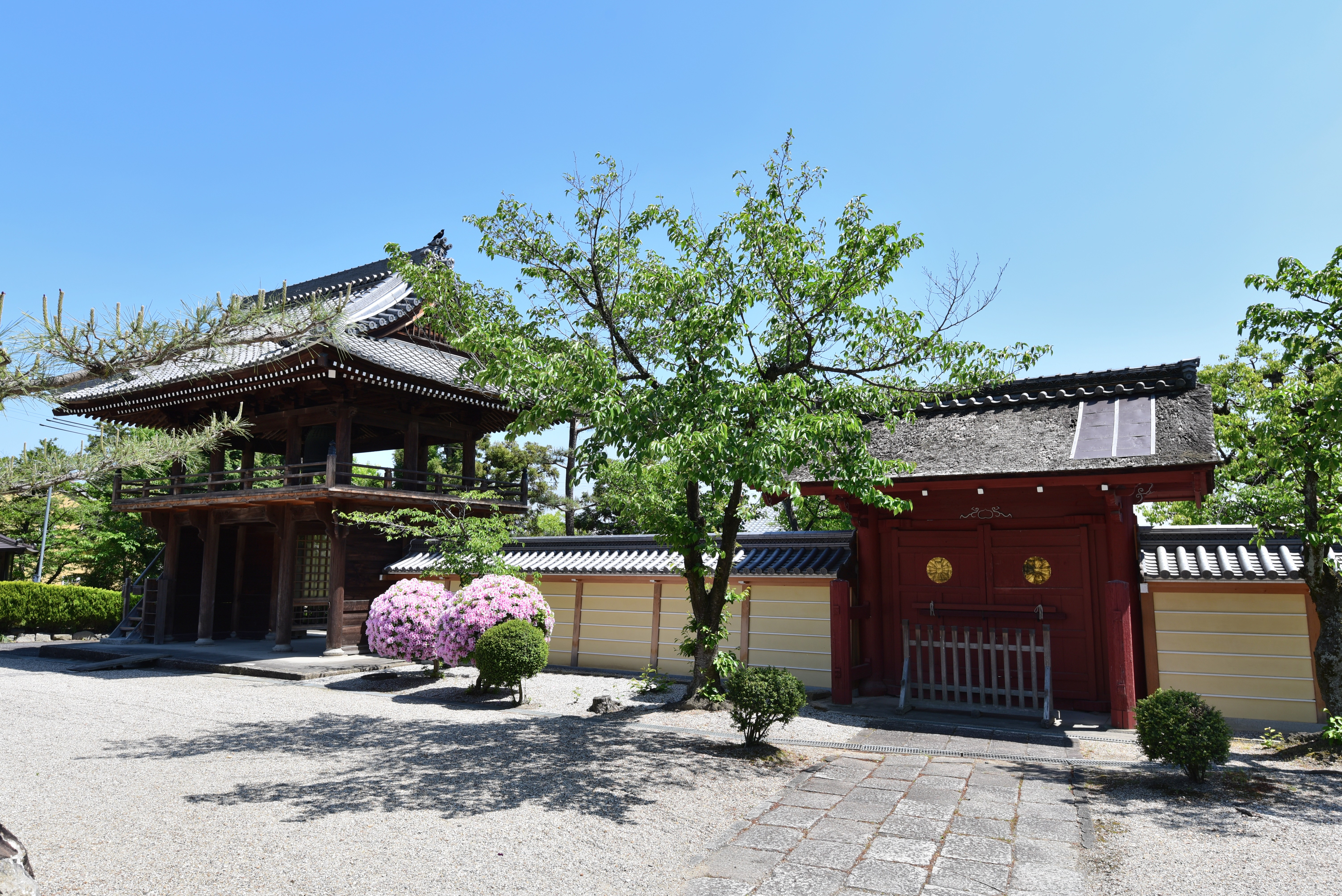 祐福寺の境内